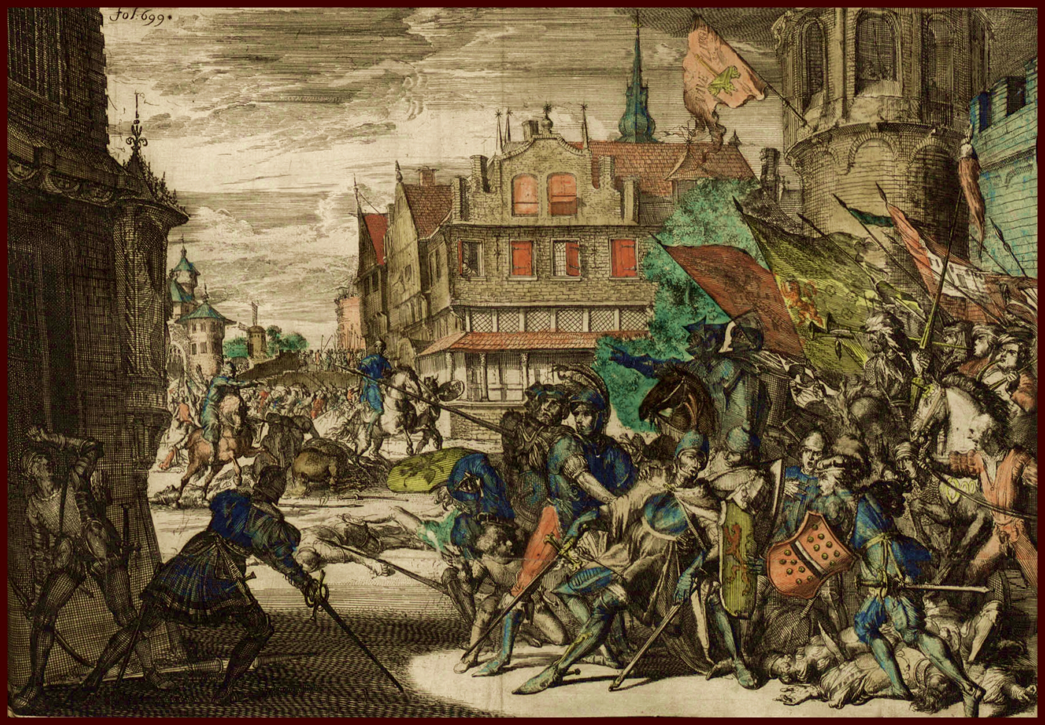 Beschrijvinge Dordrecht, Matthys Balen, Slag om Thuredrecht, 1049